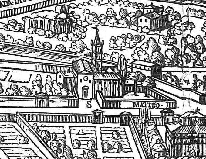 Pianta di Maggi